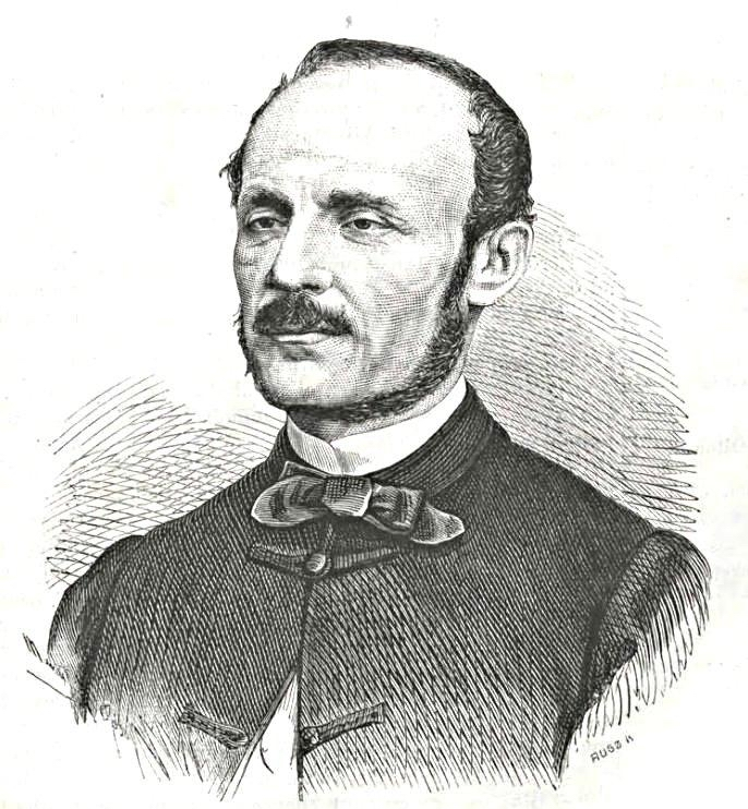 Balassa János (1814–1868) orvos, akadémikus. Rusz Károly metszete (Vasárnapi Ujság, 1868. május 24.)